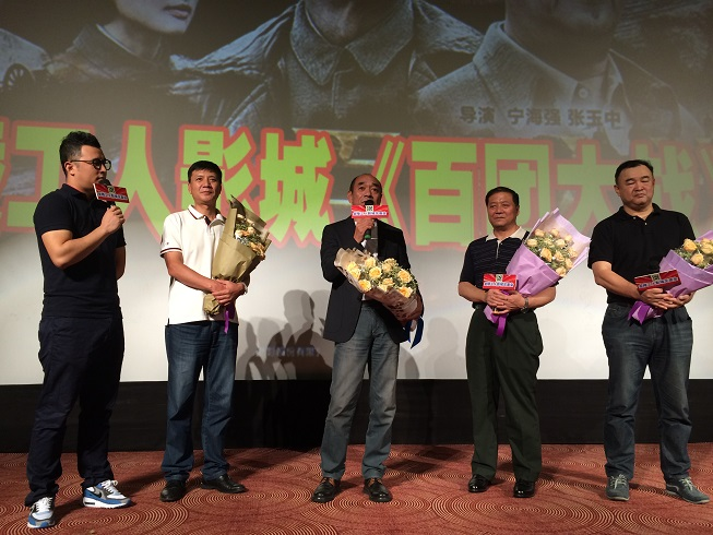 电影百团大战剧组，在南京金陵工人影城